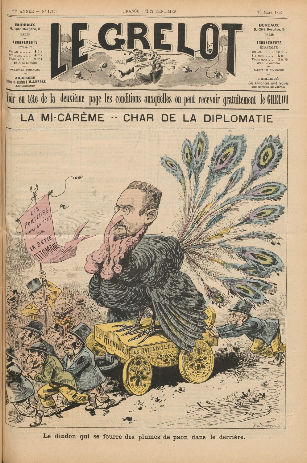 Dessin à propos de la politique et faisant référence au défilé de la Mi-Carême.